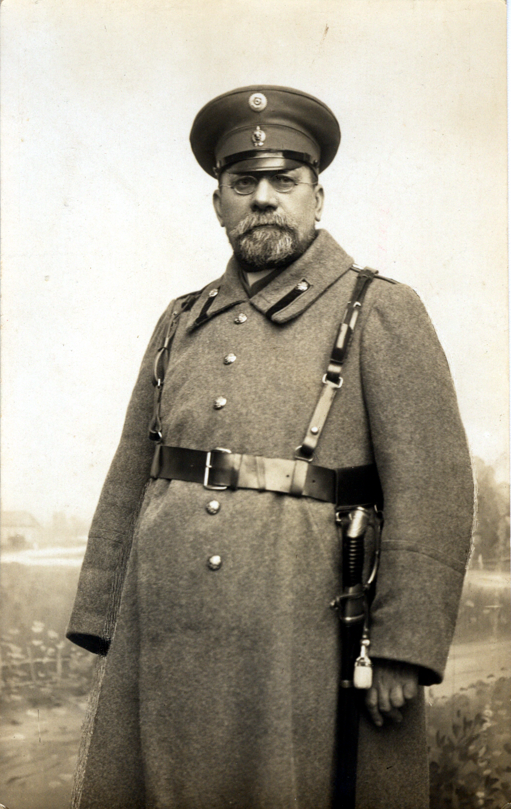 Ястремский Ф.Н. 7 декабря 1914 года, населенный пункт Siedlce